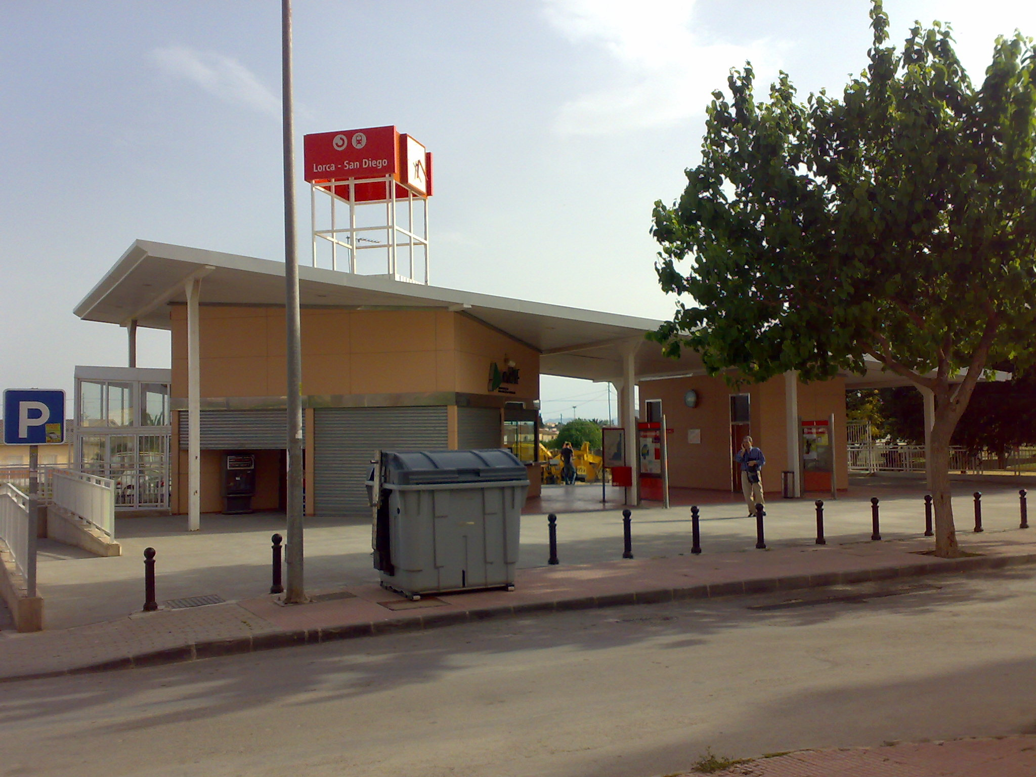 Estación de Lorca-San Diego